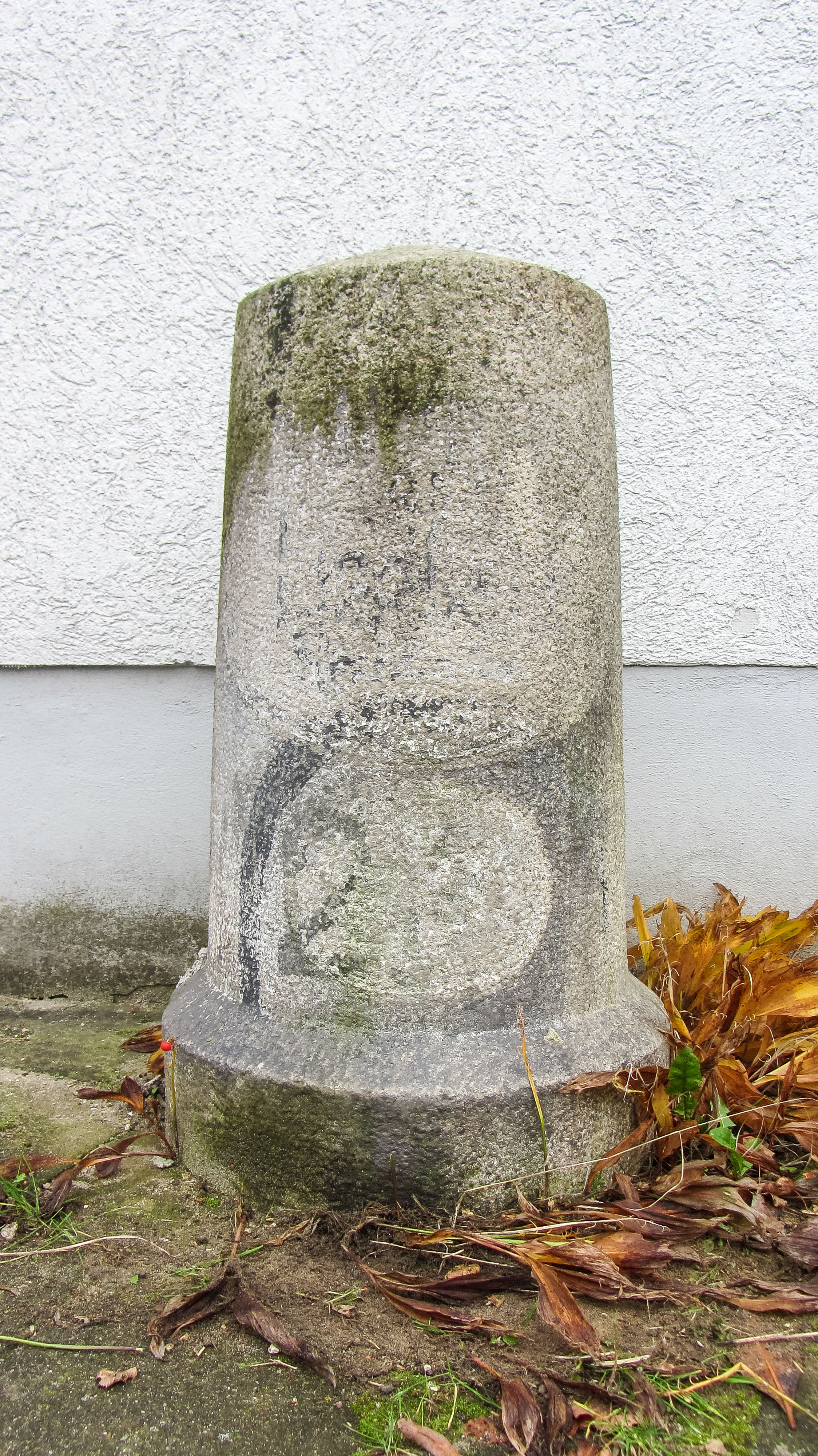 Preußischer Rundsockelstein (2285) in Beelitz, an der K 1042, Ortausgang in Richtung Lindtorf